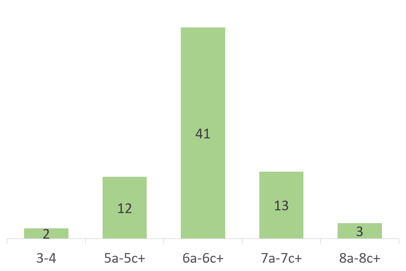 Razporeditev ocen težavnosti plezanja